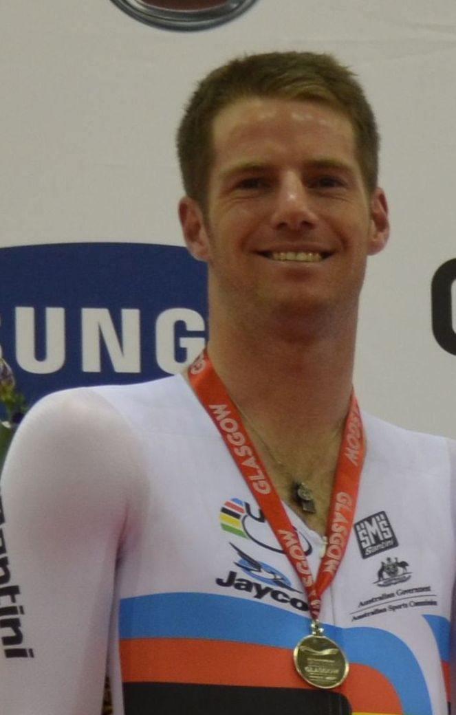 Glenn O'Shea, australischer Radsportler